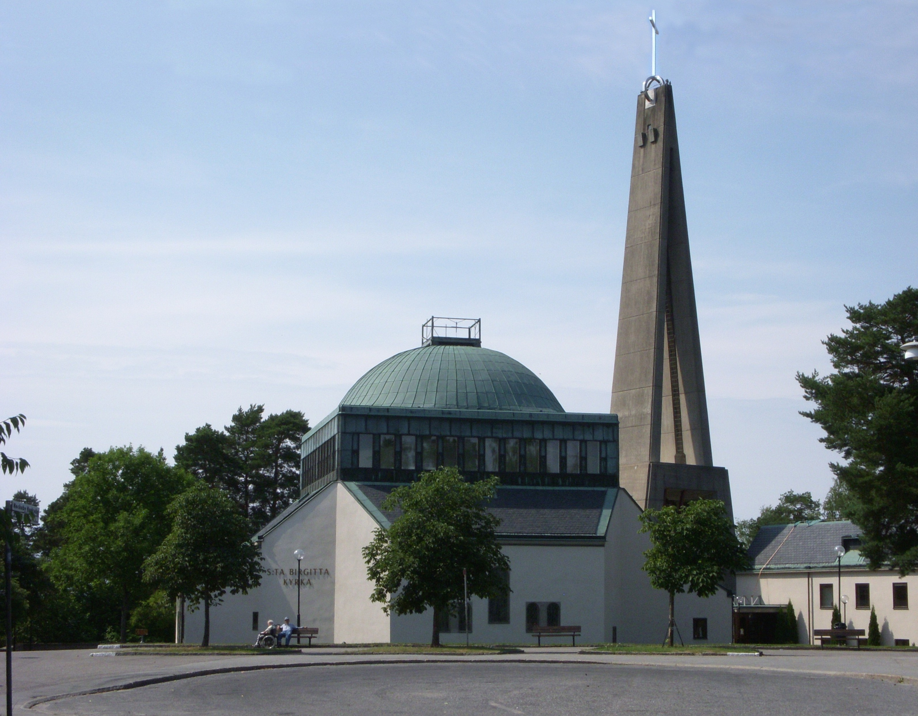 Birgittakyrkan Nockeby